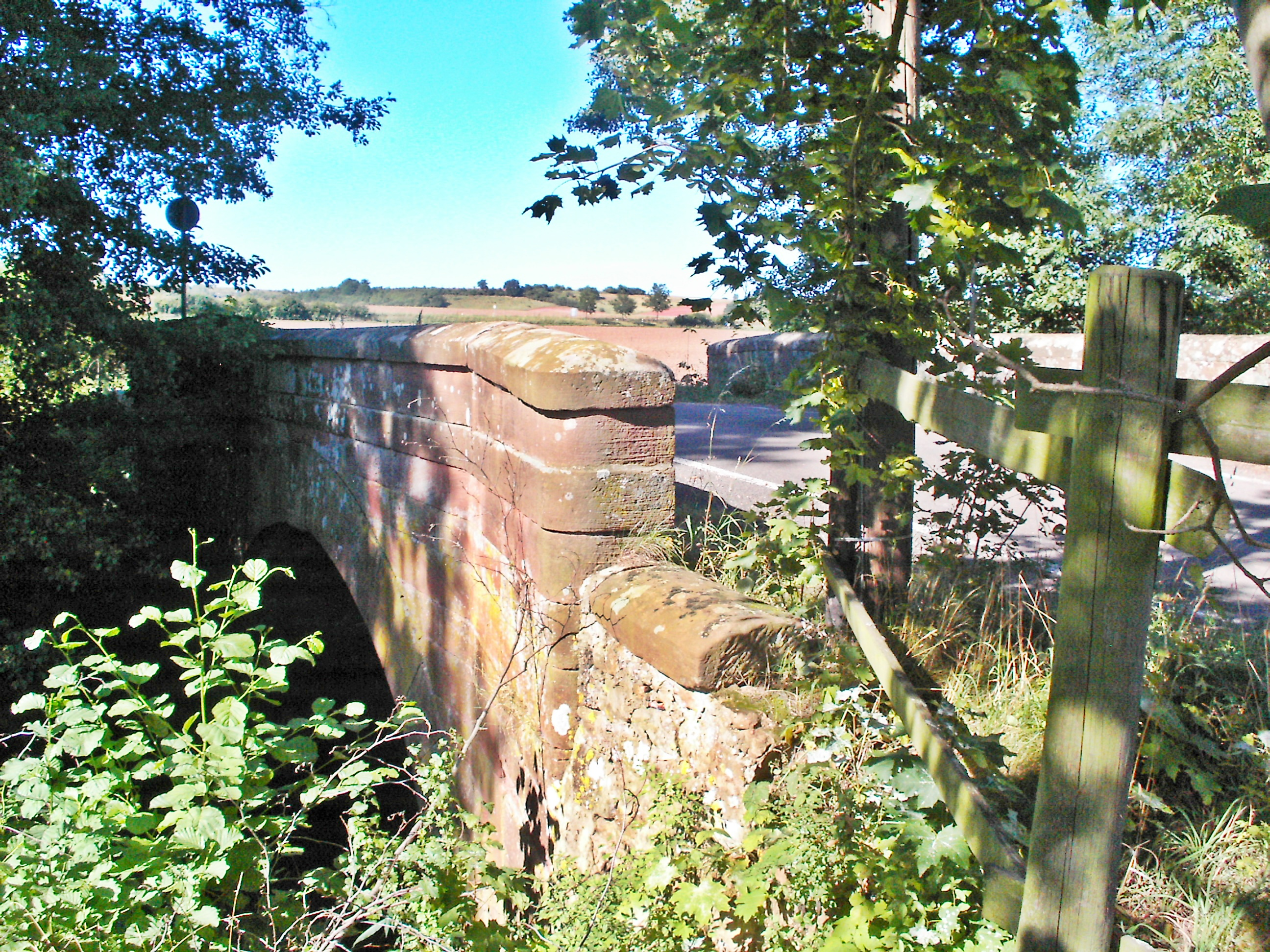 Pfrimmbrücke, Münsterhof, Dreisen, Rheinland-Pfalz, 1770